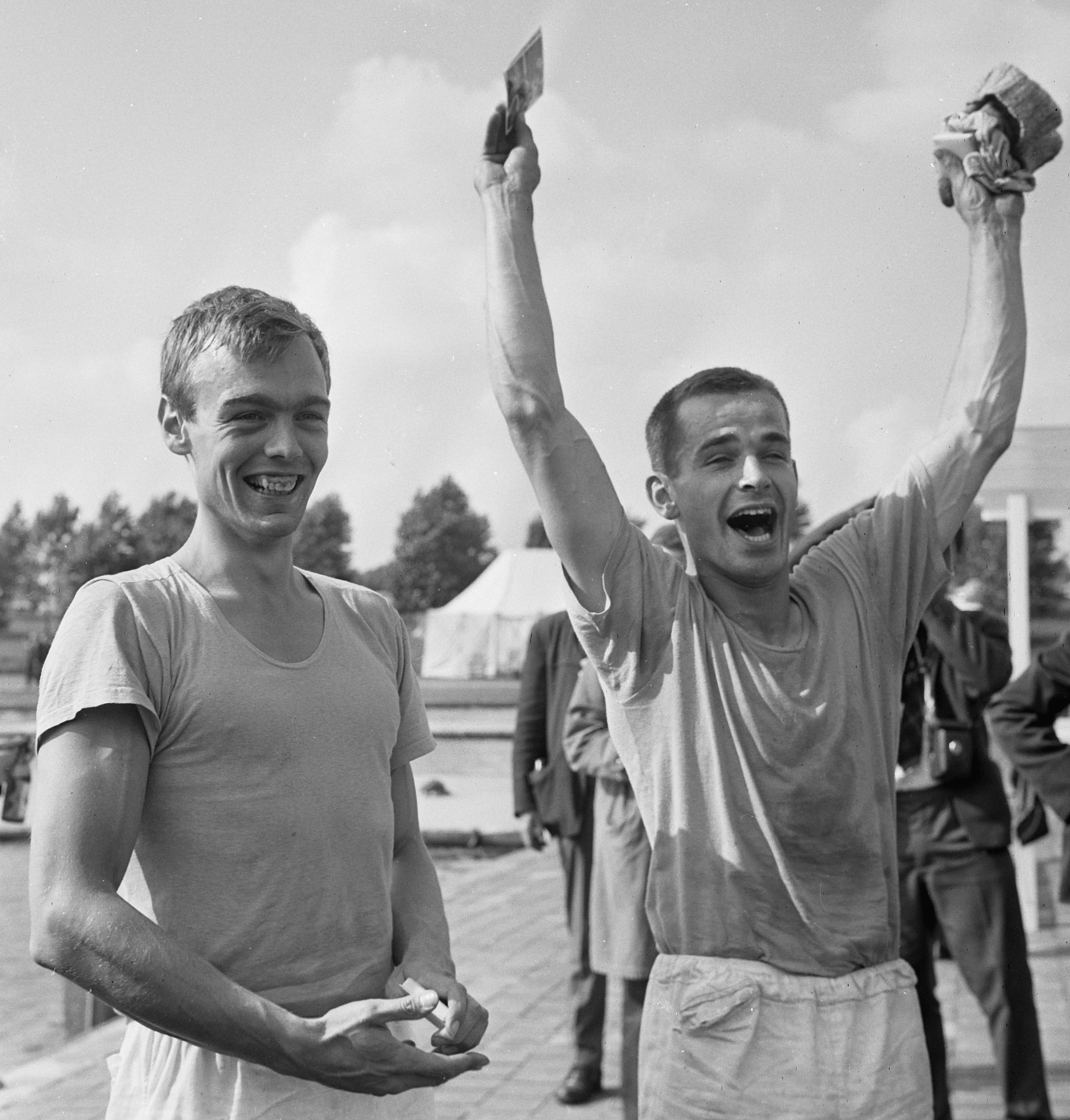 Europese roeikampioenschappen Bosbaan, juichende Venemans en Blaisse